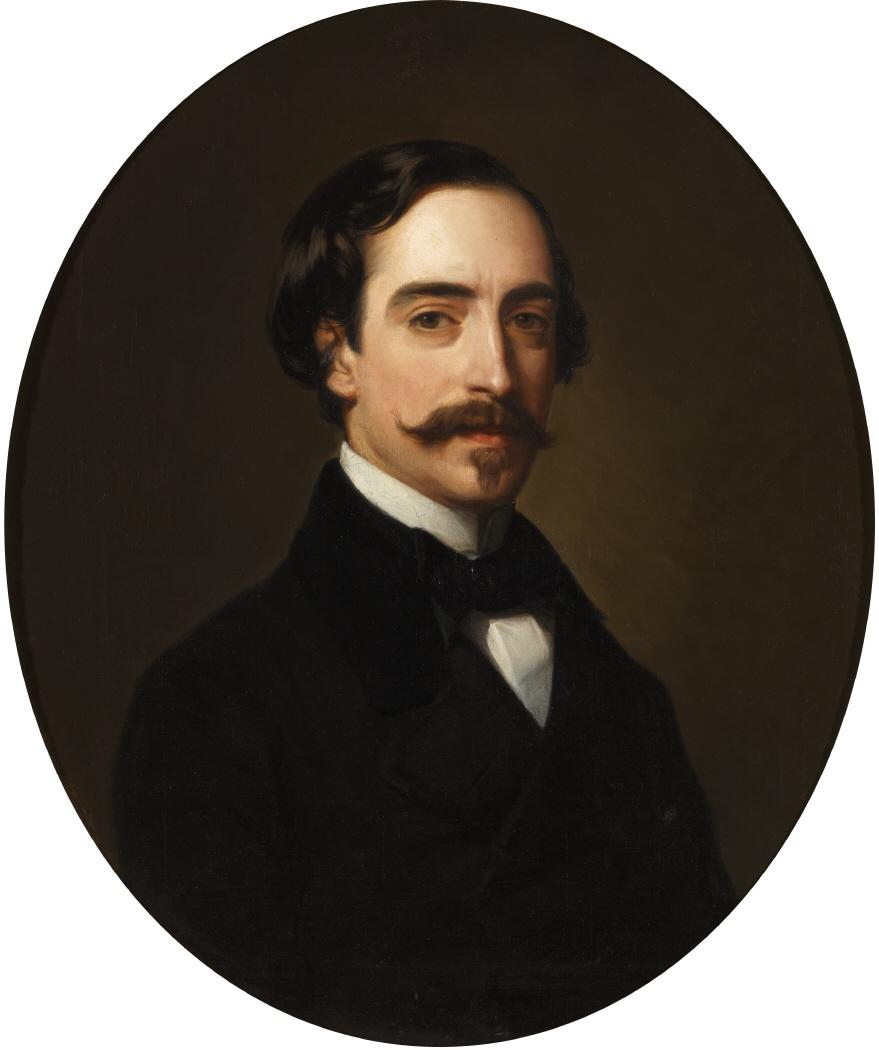 Retrato del dramaturgo español Isidoro Gil y Baus (1814-1866), que fue comendador de la Orden de Carlos III.